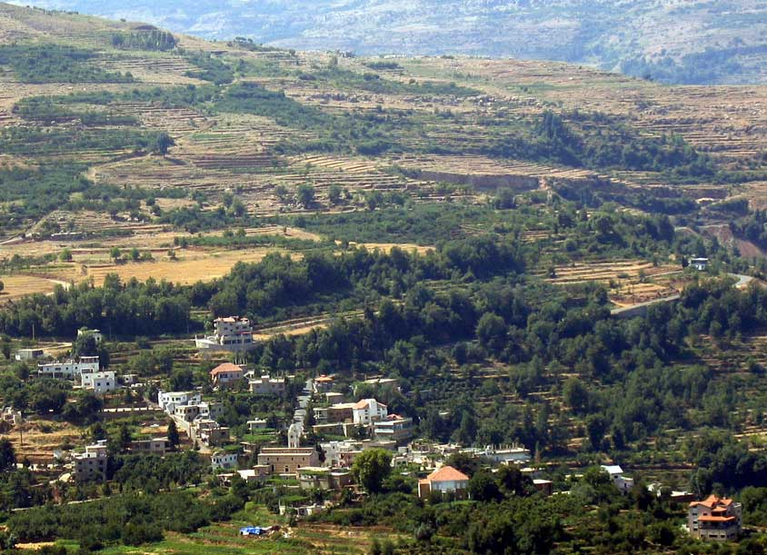 Bane072004.jpg